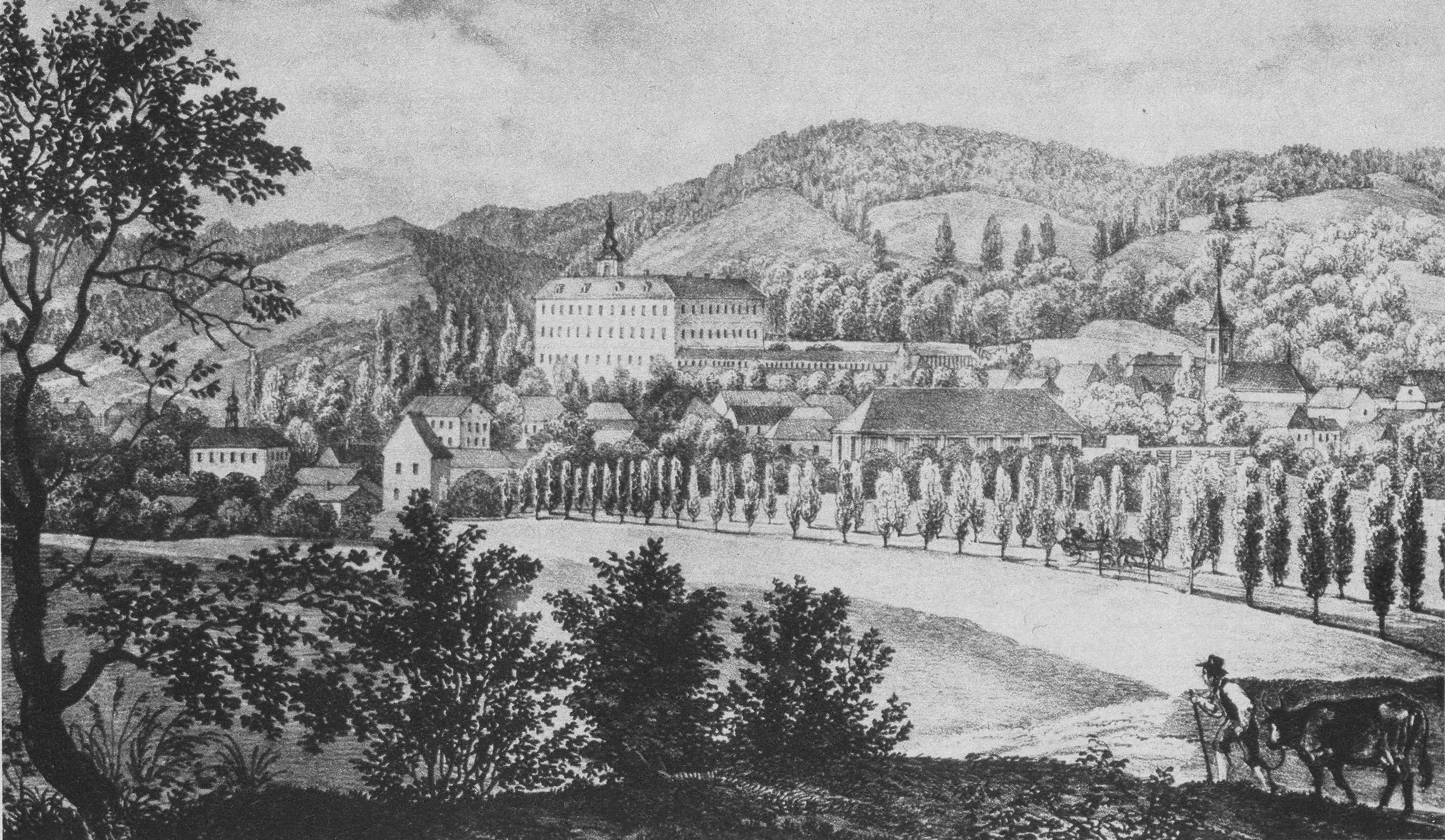 Lysice v roce 1848, rytina Františka Alexandra Hebera.